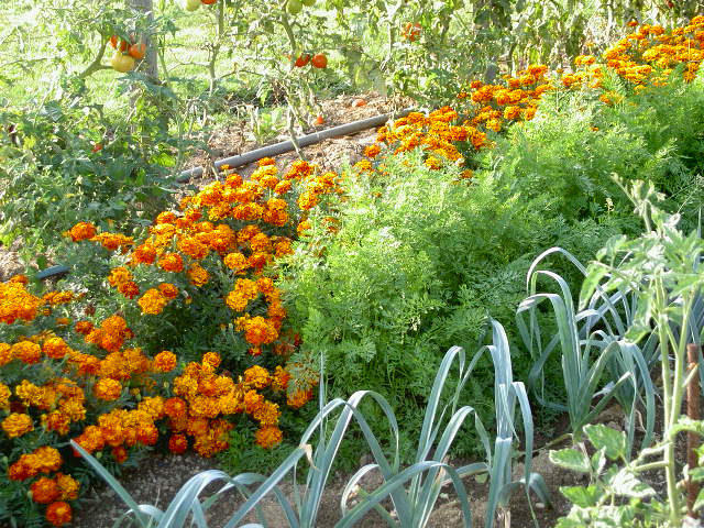 Exemple d'association végétale bénéfique : les Œillets d'Inde protègent les carottes des attaques parasitaires. Photo personnelle. GPL.